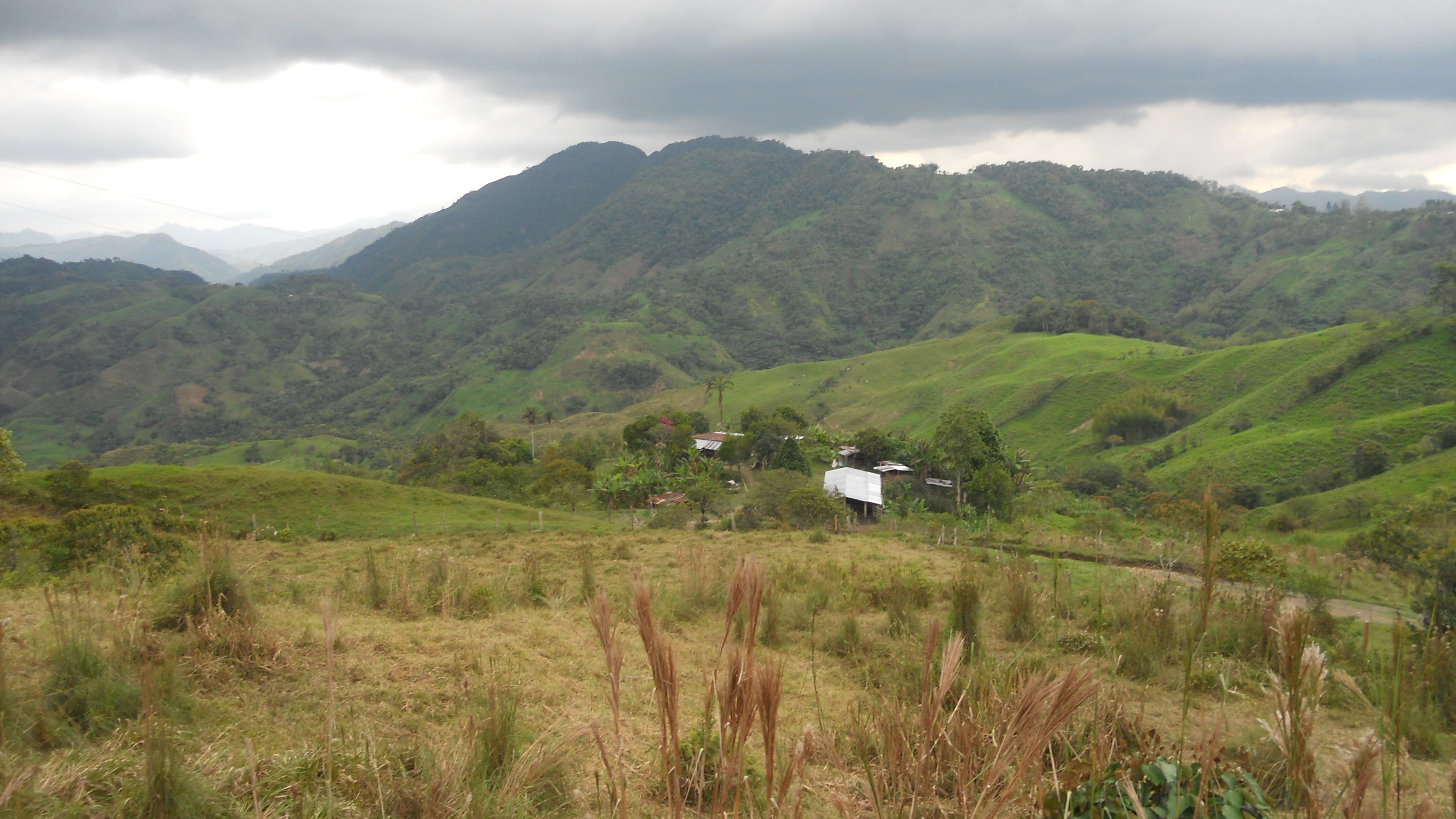 Paisajes